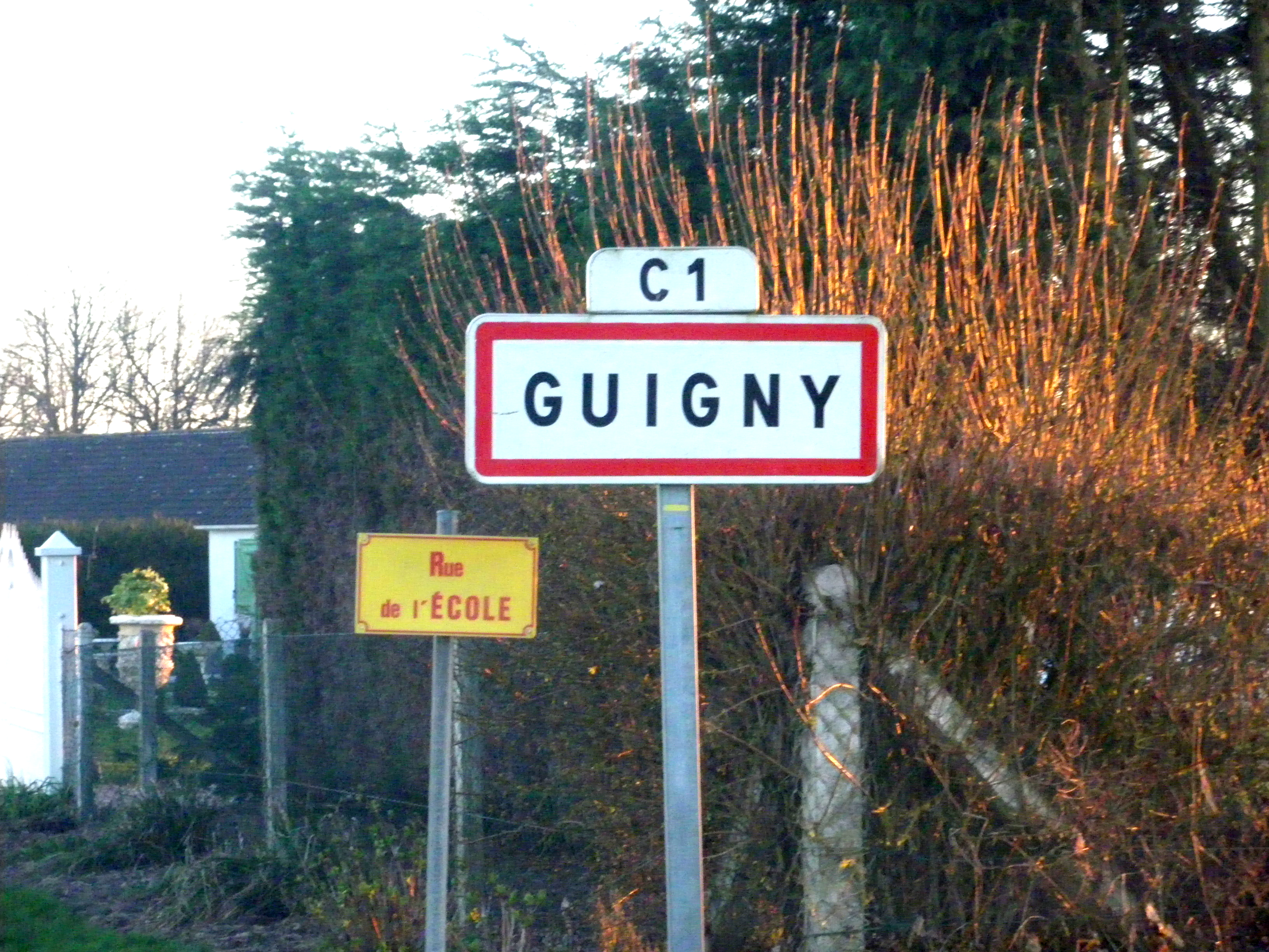 Panneau d'entrée de la commune de Guigny.